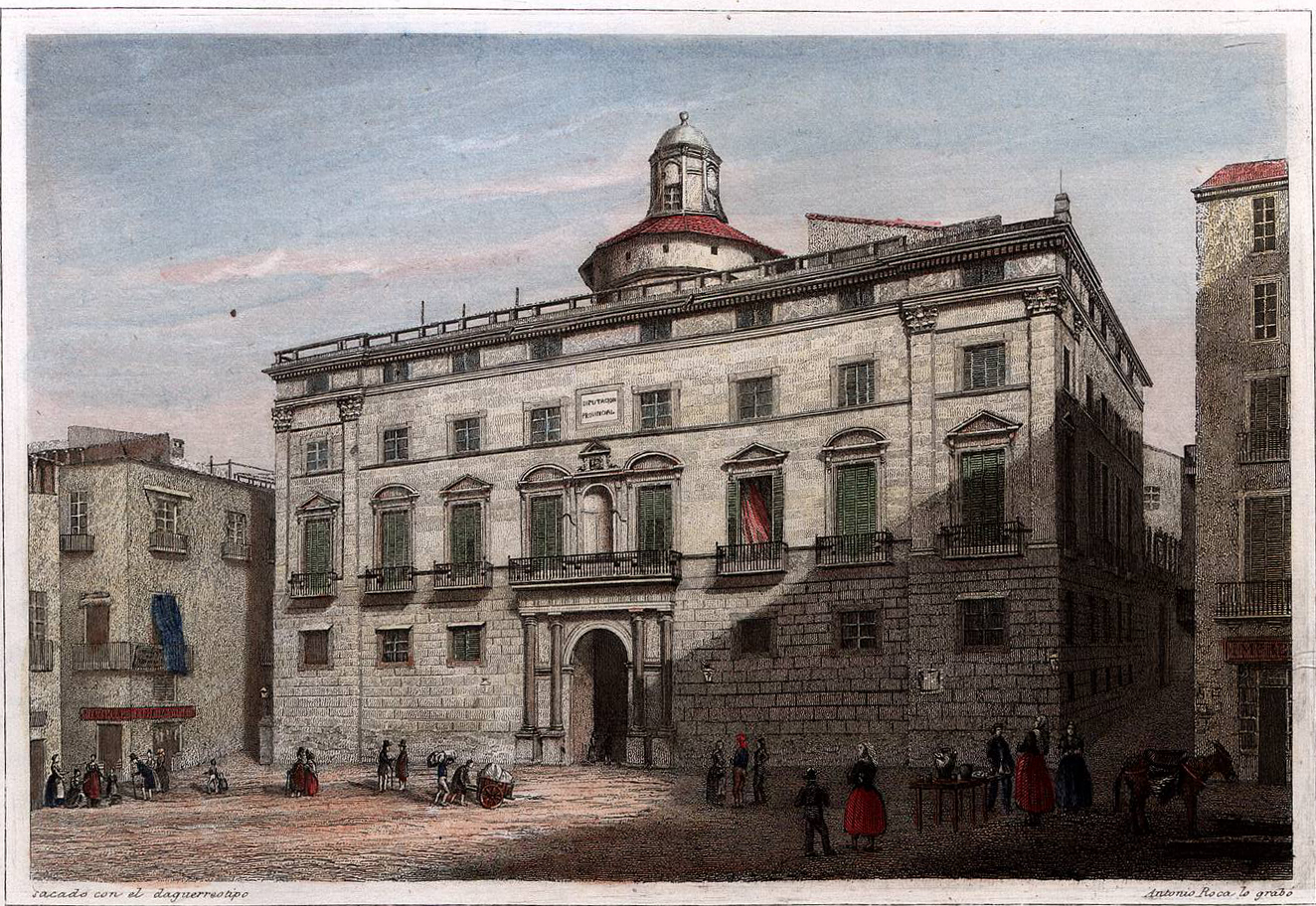 Diputación Provincial (Barcelona). Actual Palacio de la Generalitat de Catalunya.